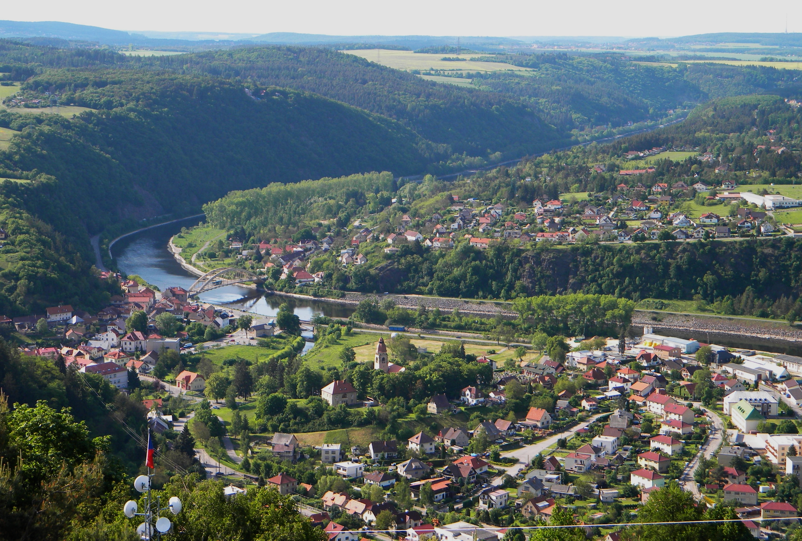 Pohled na Štěchovice z bývalé betonárky u přečerpávací elektrárny na Homoli.